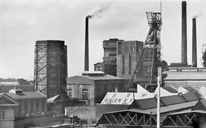 Zeche Victoria Mathias in Essen